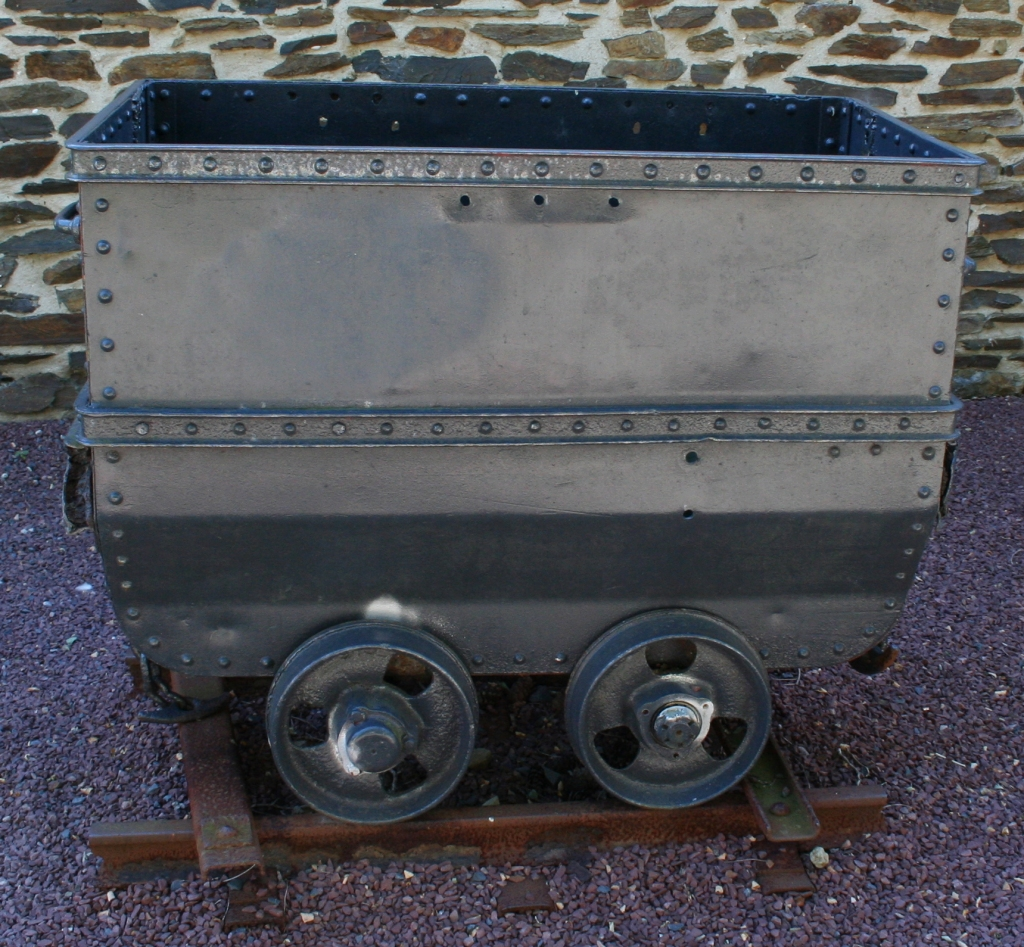 Wagonnet de mine - Musée de la mine - Molay-Littry - Calvados - France